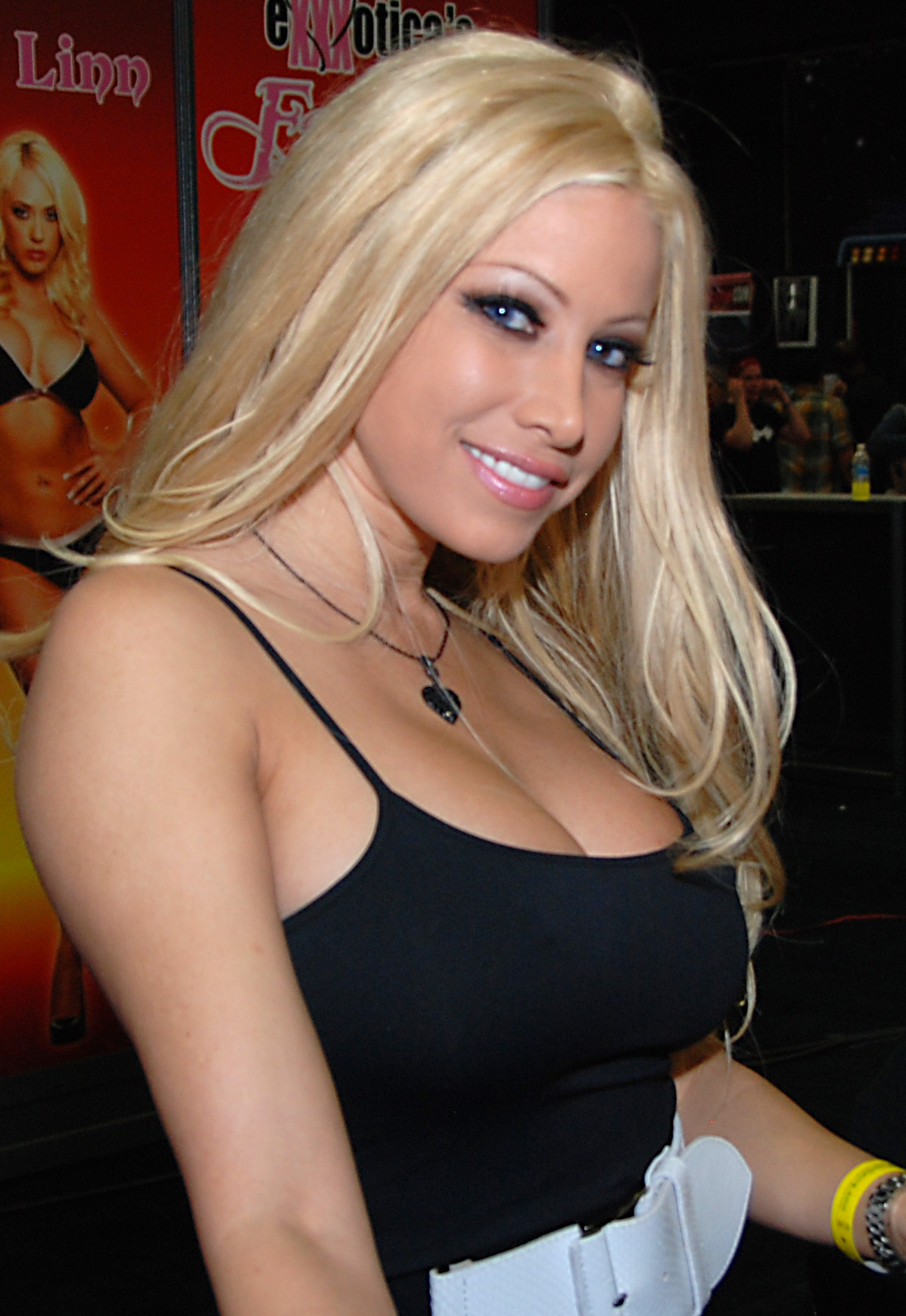 DSC_0961A